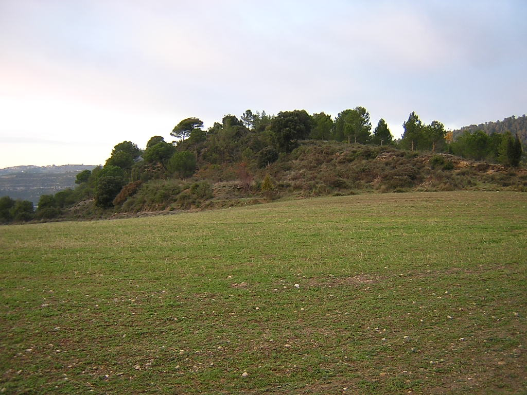 El Serrat dels Ametllers (Monistrol de Calders, Moianès)